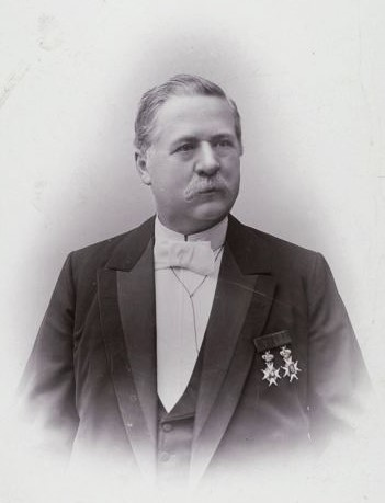 Bankdirektör Fredrik Henckel (1828-1912)